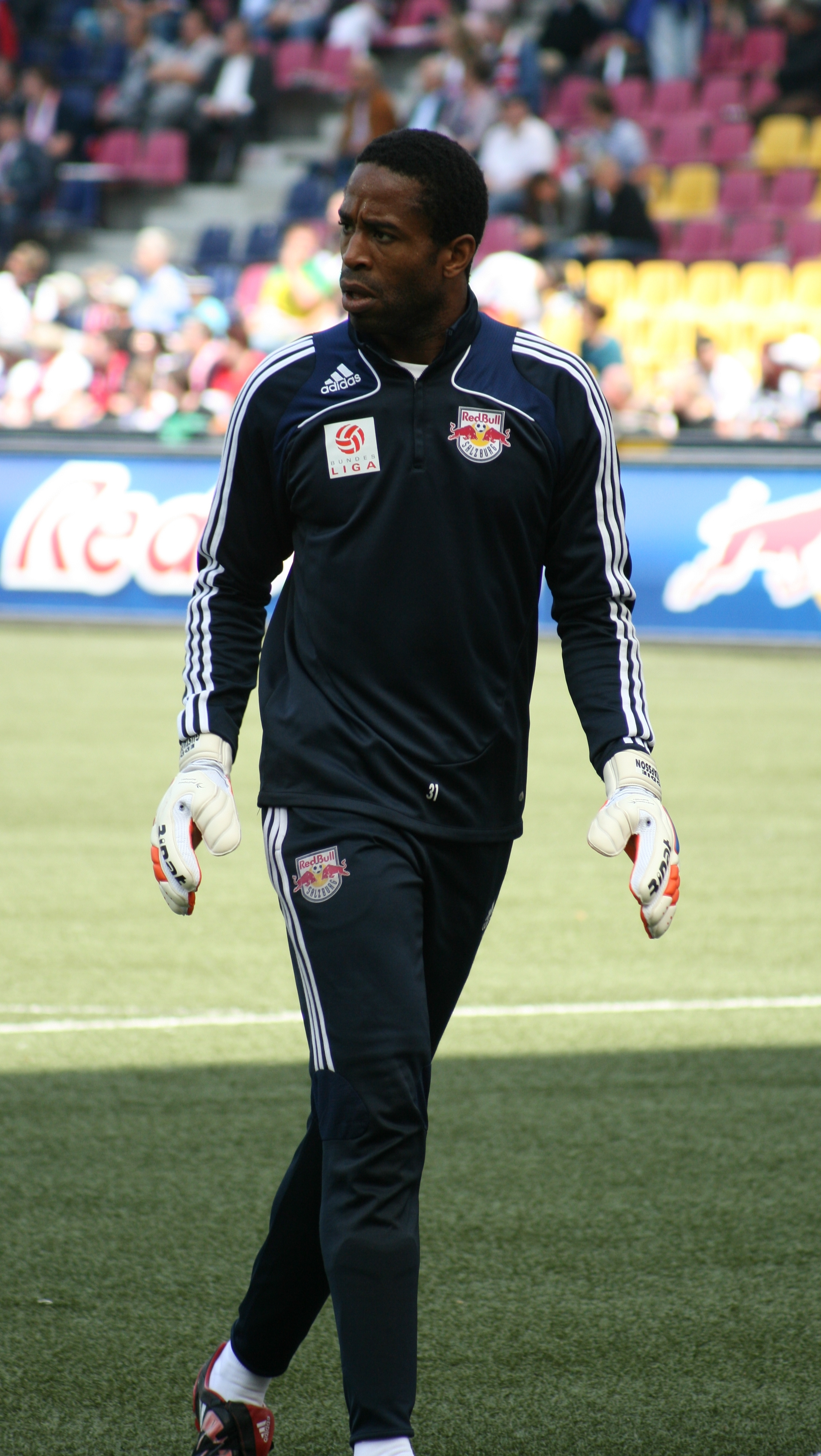 Eddie Gustafsson beim Aufwärmen